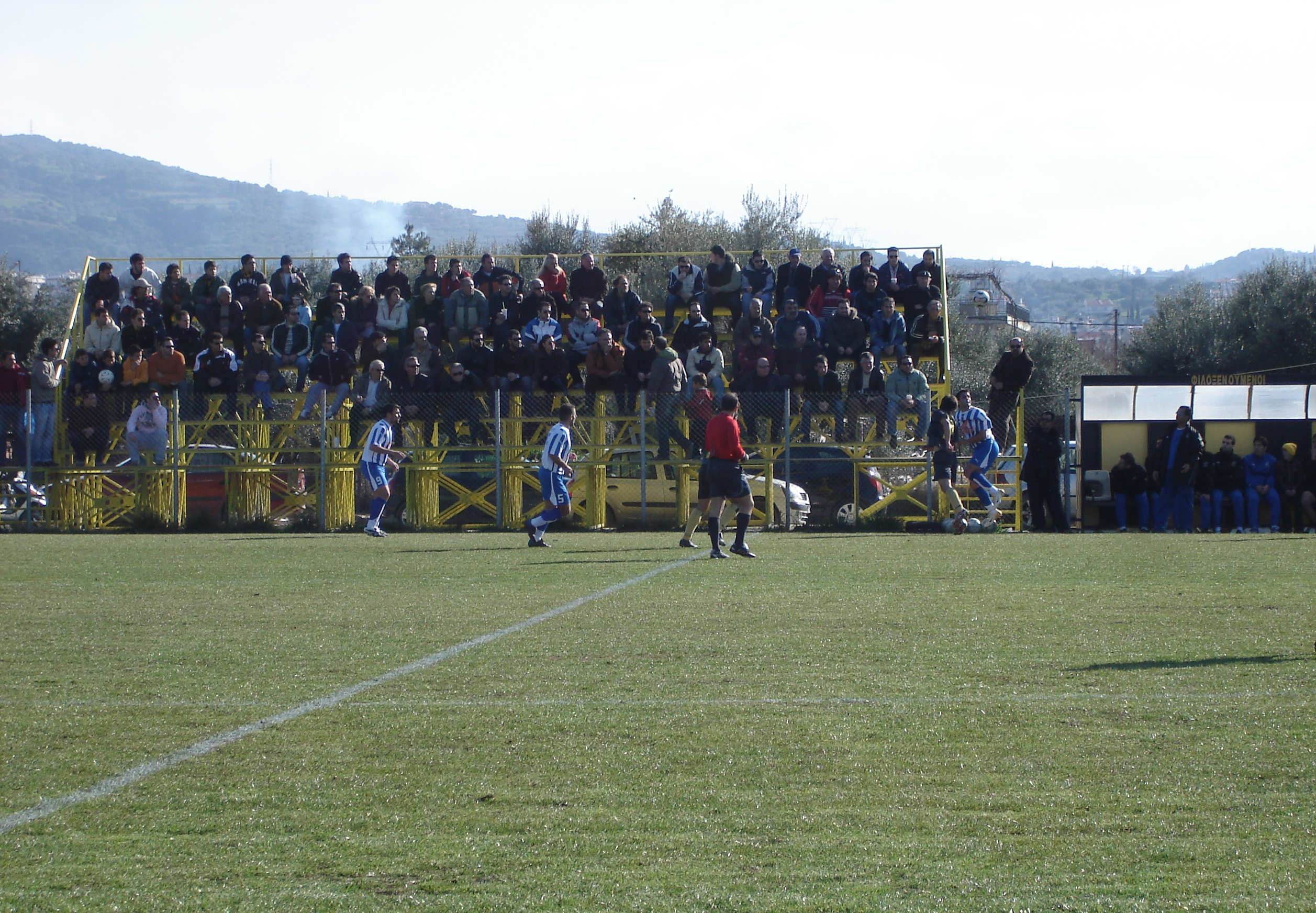 Fostiras Ovryas